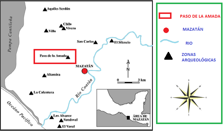 zona arqueologicas de mazatán chiapas, PASO DE LA AMADA